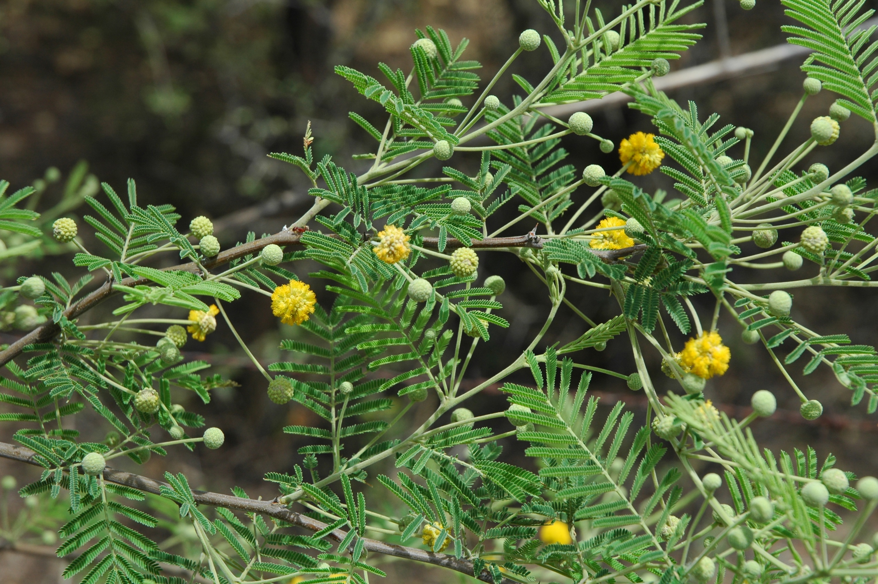 Acacia aroma (aromito).